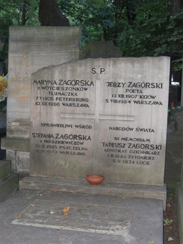 Jerzy Zagórski's monument (Powązki Cemetery)